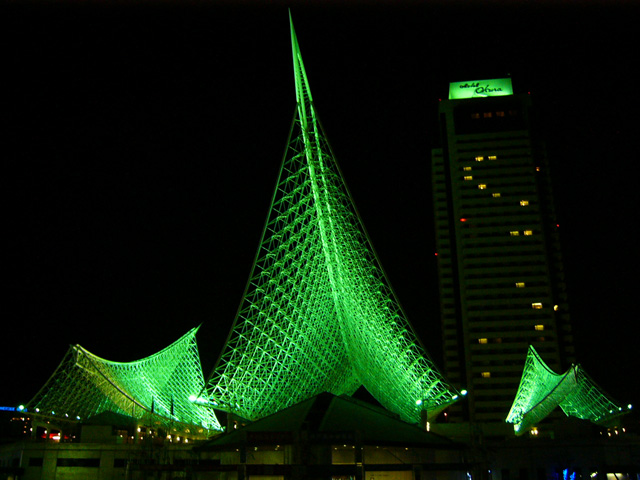 神戸海洋博物館（神戸港） 2005年4月27日,663highland撮影